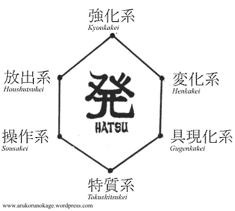 Nen Hatsu chart